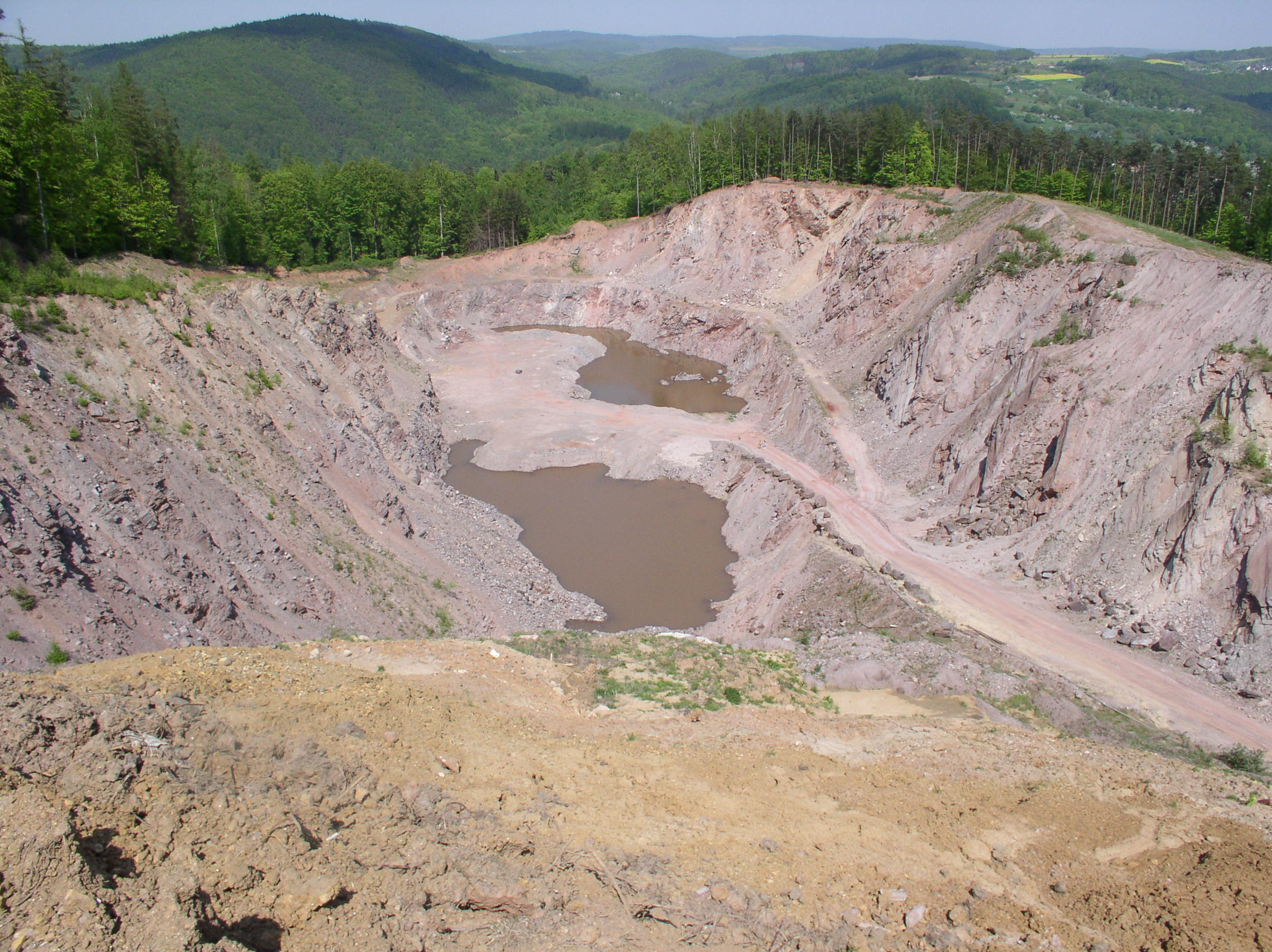 Hemsbacher Quarzitsteinbruch an der Hohen Mark. Im Hintergrund der Schanzenkopf und der Heidkopf